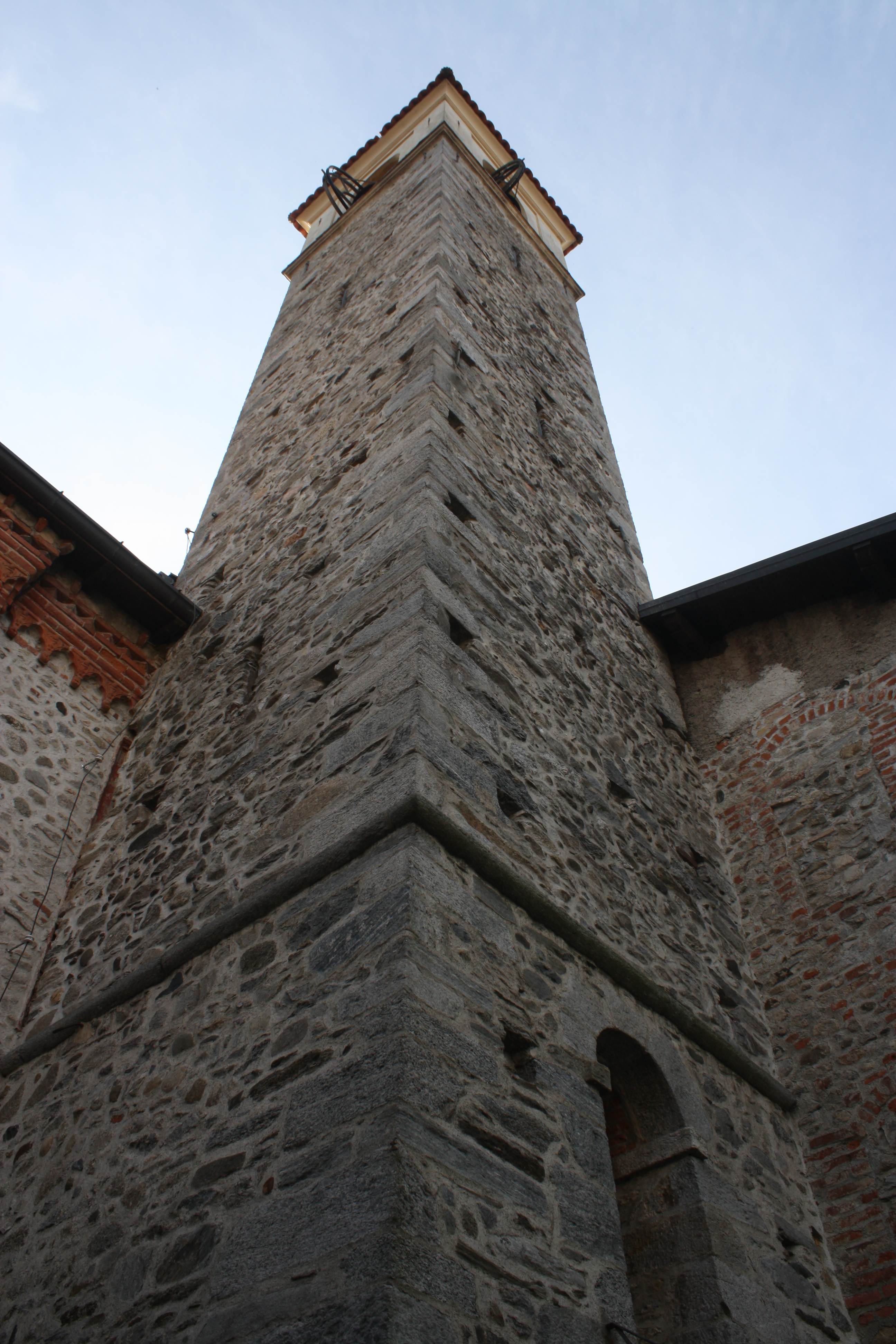 La chiesa di Santa Maria Annunciata a Brunello, in provincia di Varese.